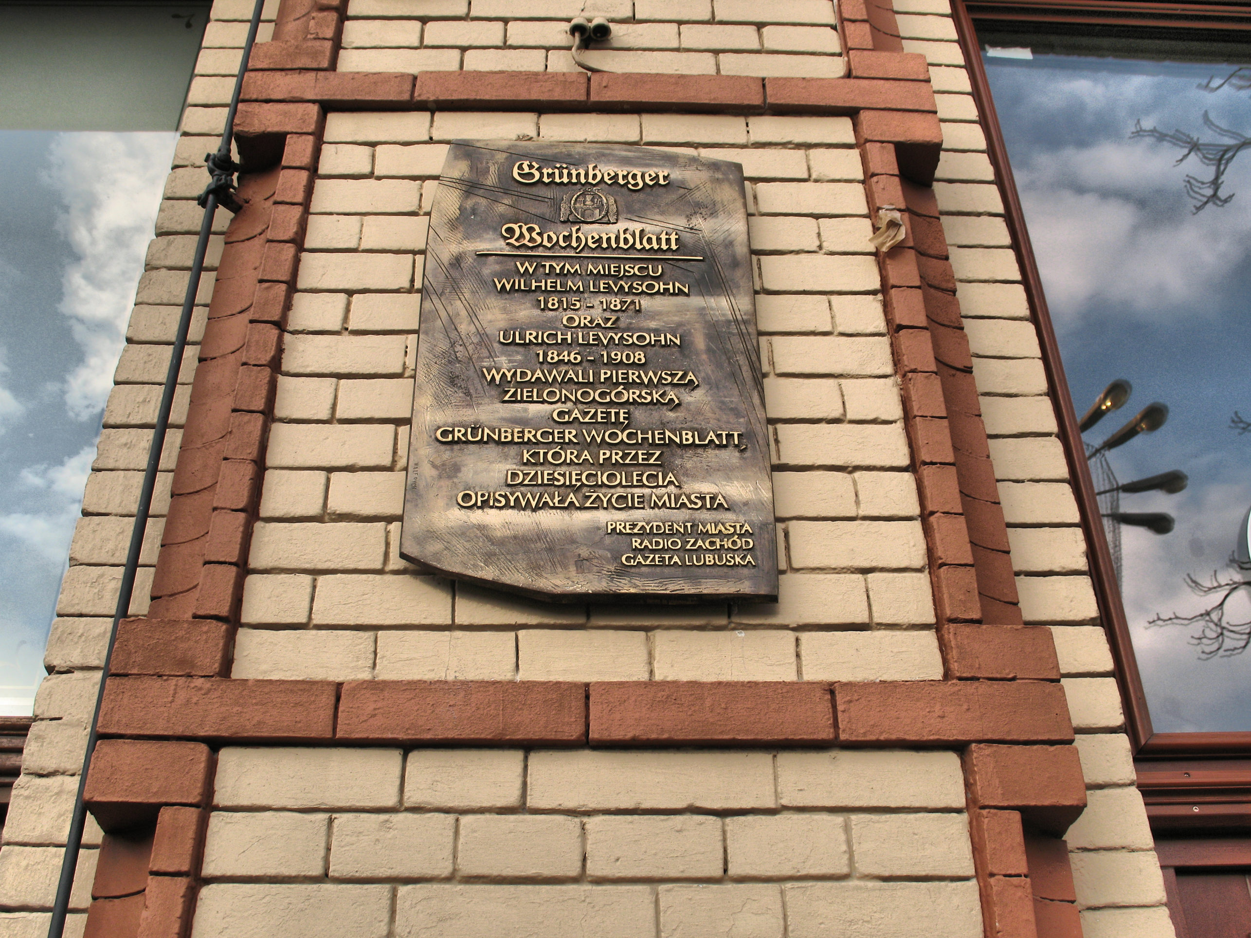 Tablica pamiątkowa w miejscu dawnej drukarni Wilhelma Levysohna w Zielonej Górze